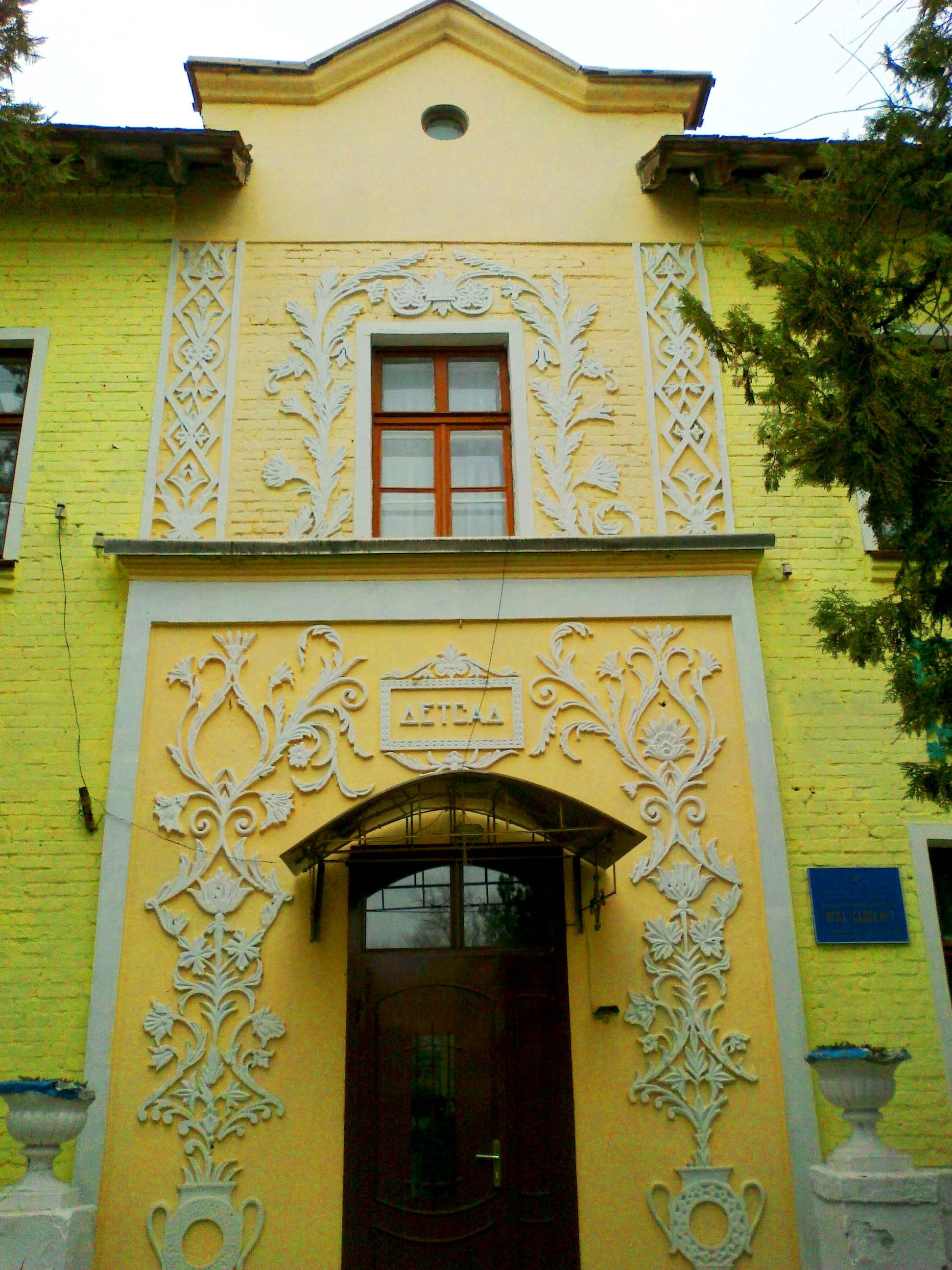 Новокаховський дитсадок